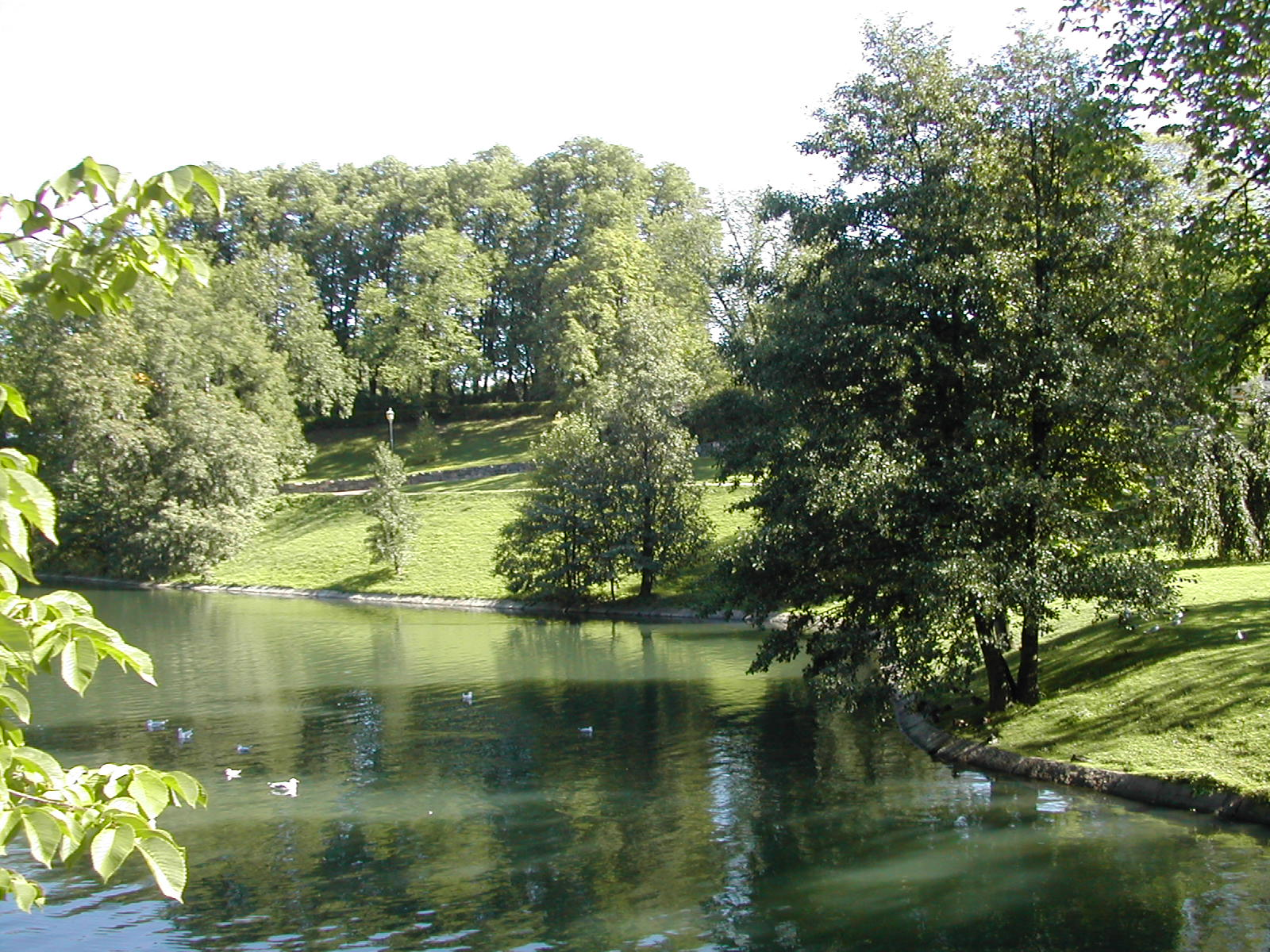 Frogner Hovedgård, Frogner, Oslo